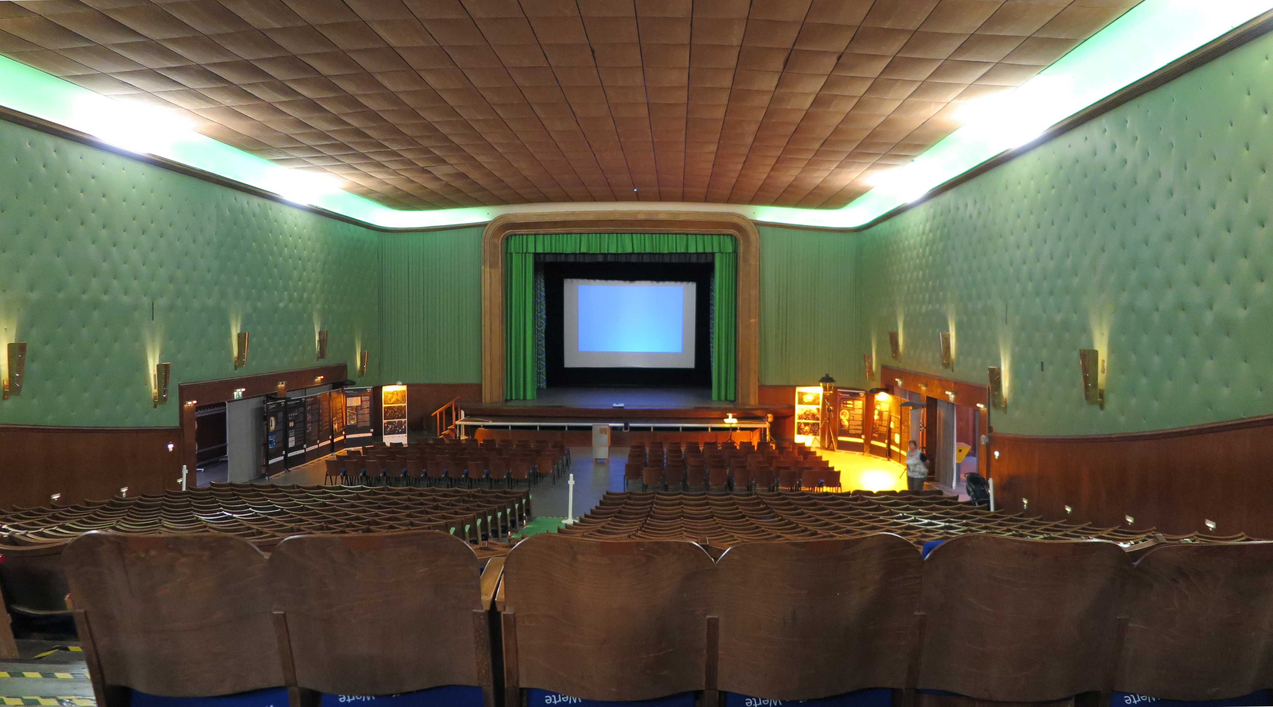 Blick in das 1953 bzw. 1954 fertiggestellte belgische Truppenkino des ehemaligen Truppenübungsplatzes Vogelsang. 2006 wurde das Kino unter Denkmalschutz gestellt und 2011 saniert. Die grüne Kunstlederbespannung und die typischen Trichterlampen der damaligen Zeit wurden erhalten. Heute fasst das Kino 850 feste Plätze und kann auf 1100 Plätze aufgestuhlt werden. FILMTHEATER-ÄSTHETIK DER 50ER JAHRE - Parkett oder Loge? in rheinische ART, 3/2014 This image shows a heritage building in Germany, located in the North Rhine-Westphalian city Schleiden (no. 170).